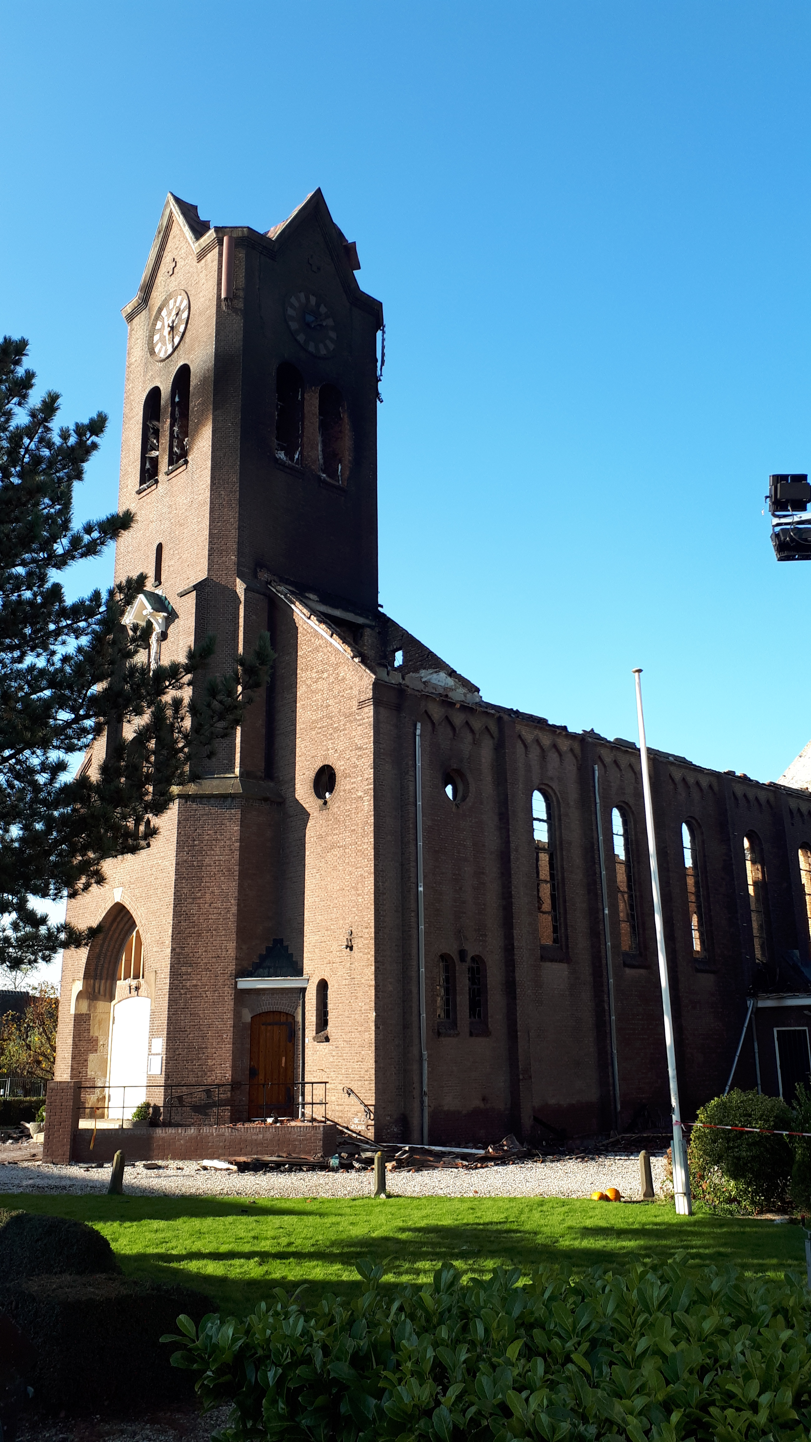 Onze-Lieve-Vrouw-Geboortekerk (Hoogmade) na de brand